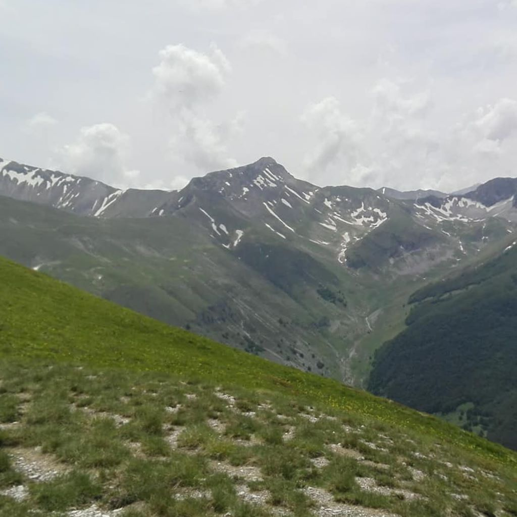 Pizzo Berro versante Nord, visto da M.Rotondo